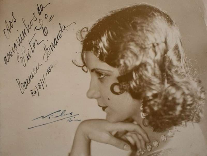 Carmen Miranda em foto autografada e datada de 18 de janeiro de 1930